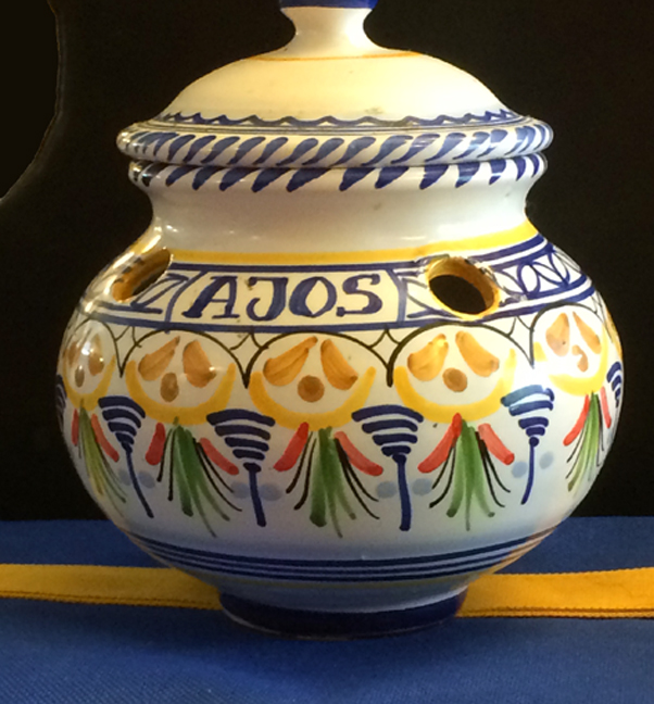 Knoblauchtopf mit Belüftungslöchern und mit Deckel aus Steingut. Hier aus Spanien (Knoblauch wird im Spanischen als "Ajo" bezeichnet).